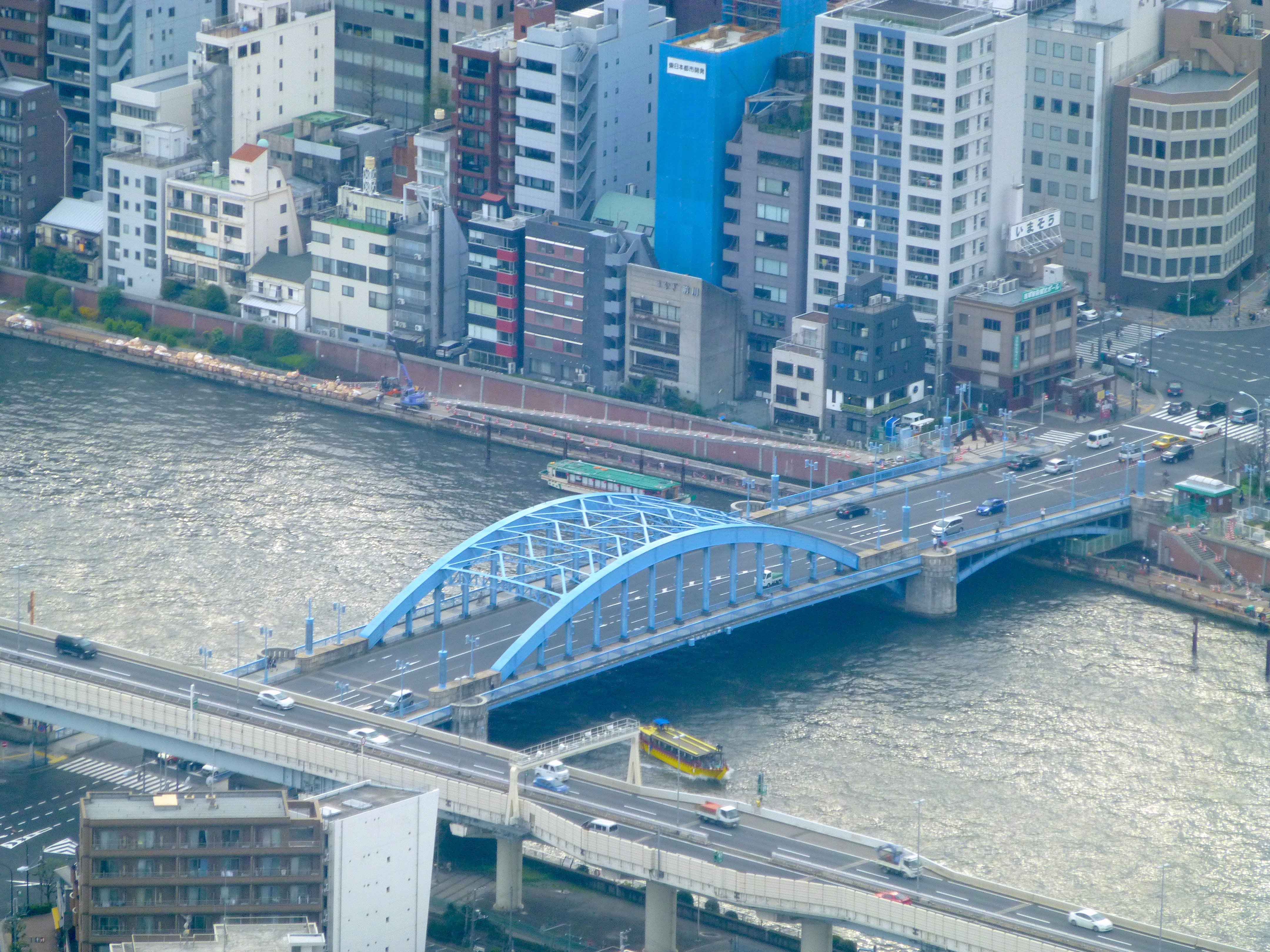 駒形橋（こまがたばし, komagata-bashi bridge）